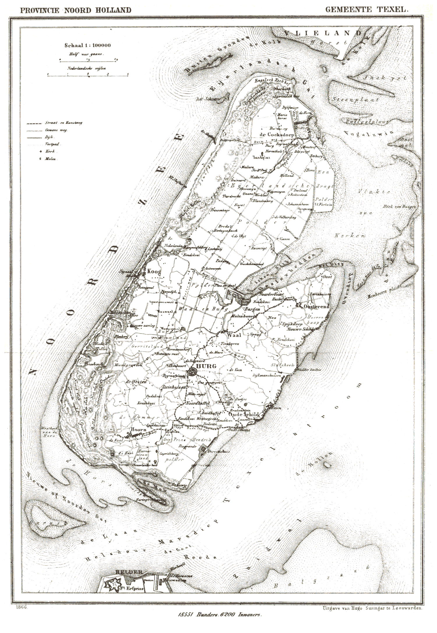 Kaart van Texel uit Gemeente Atlas van Nederland, J. Kuyper 1865-1870, Uitgave Hugo Suringar Leeuwarden. Rechts onder Buitenplaats Brakenstein